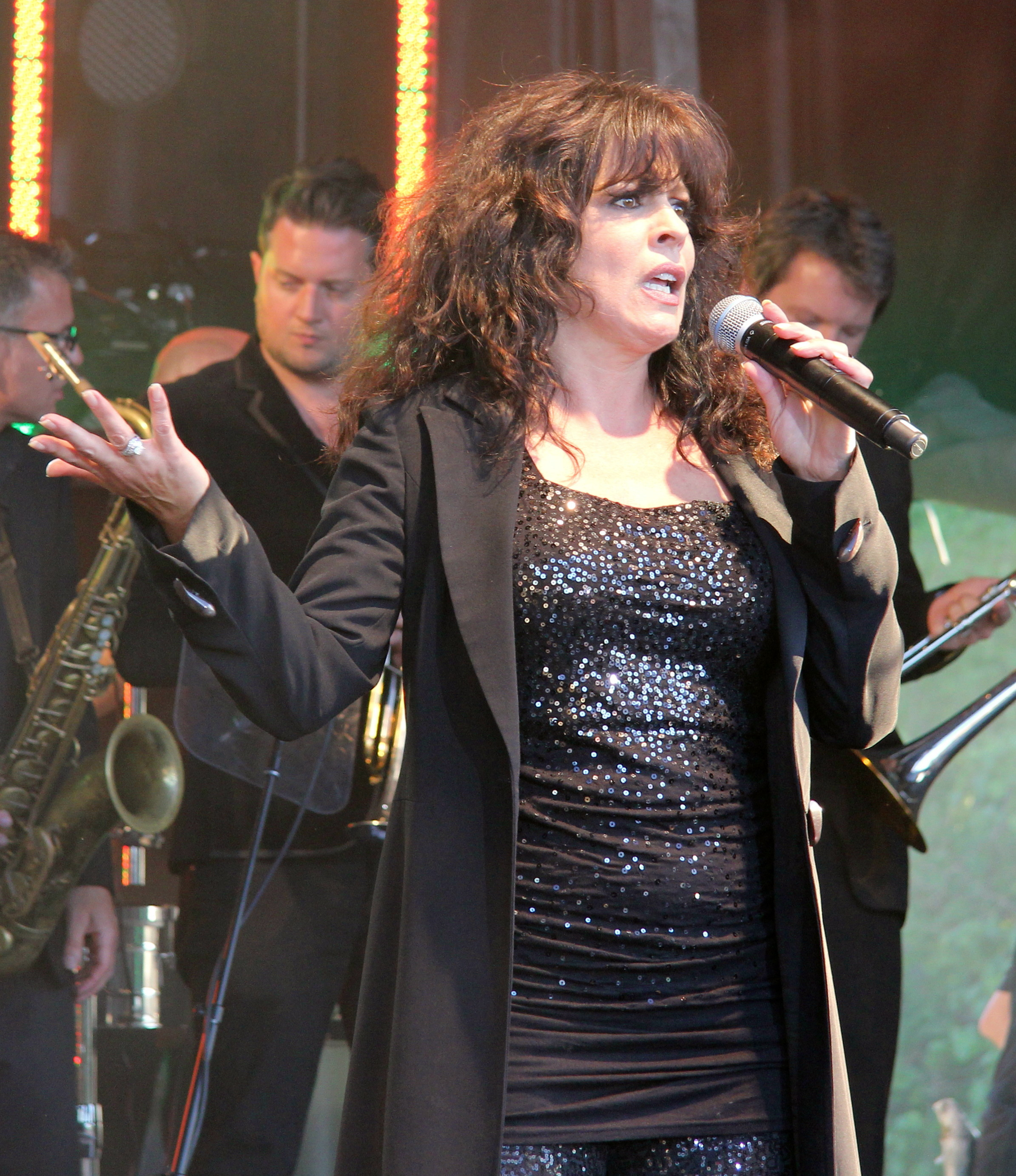 Patti Russo_1364